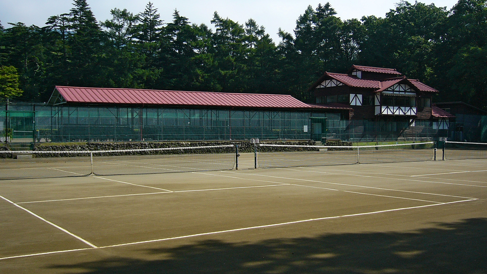 Tennis coat in Karuizawa, Japan